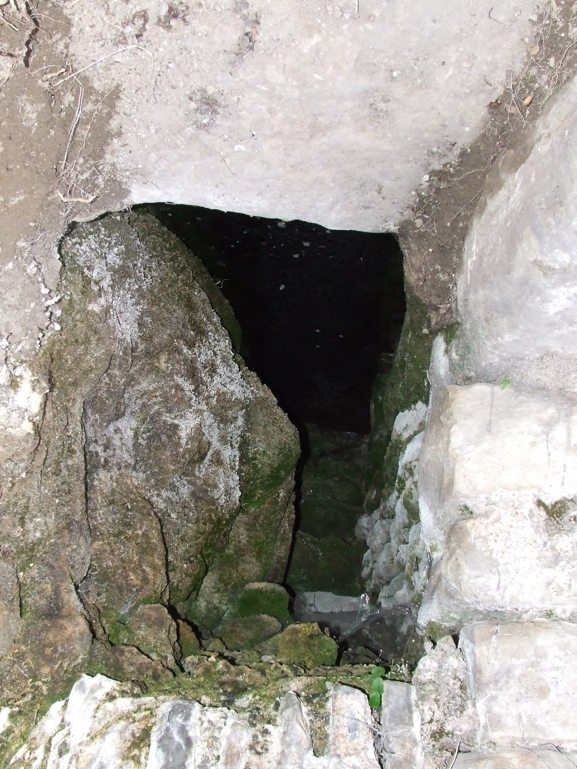 La Font de la Casanova (Monistrol de Calders, Moianès)